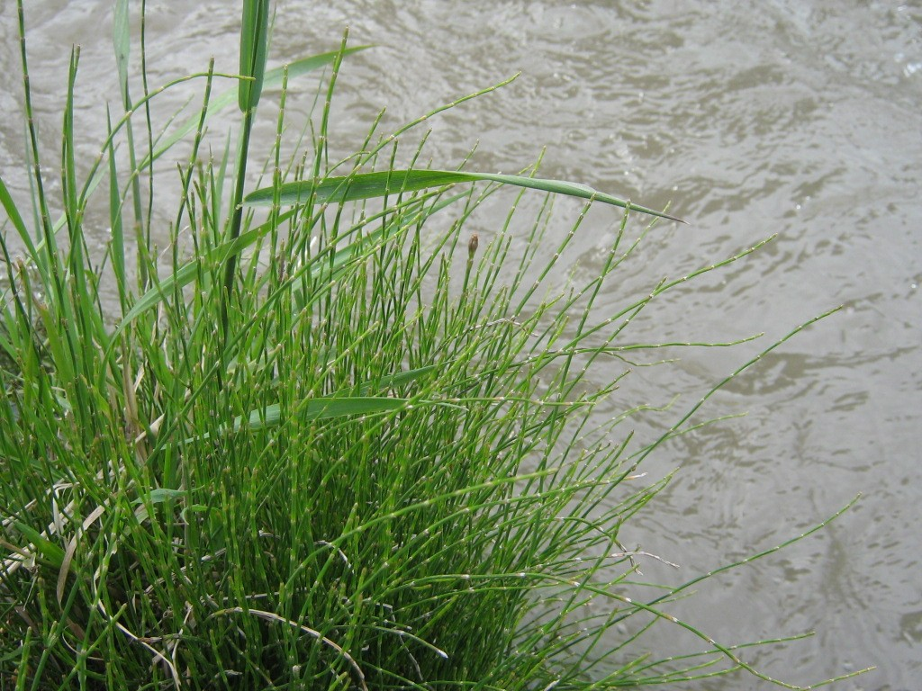 Equisetum bogotense Kunth, Pirque (Puente Alto), Chile